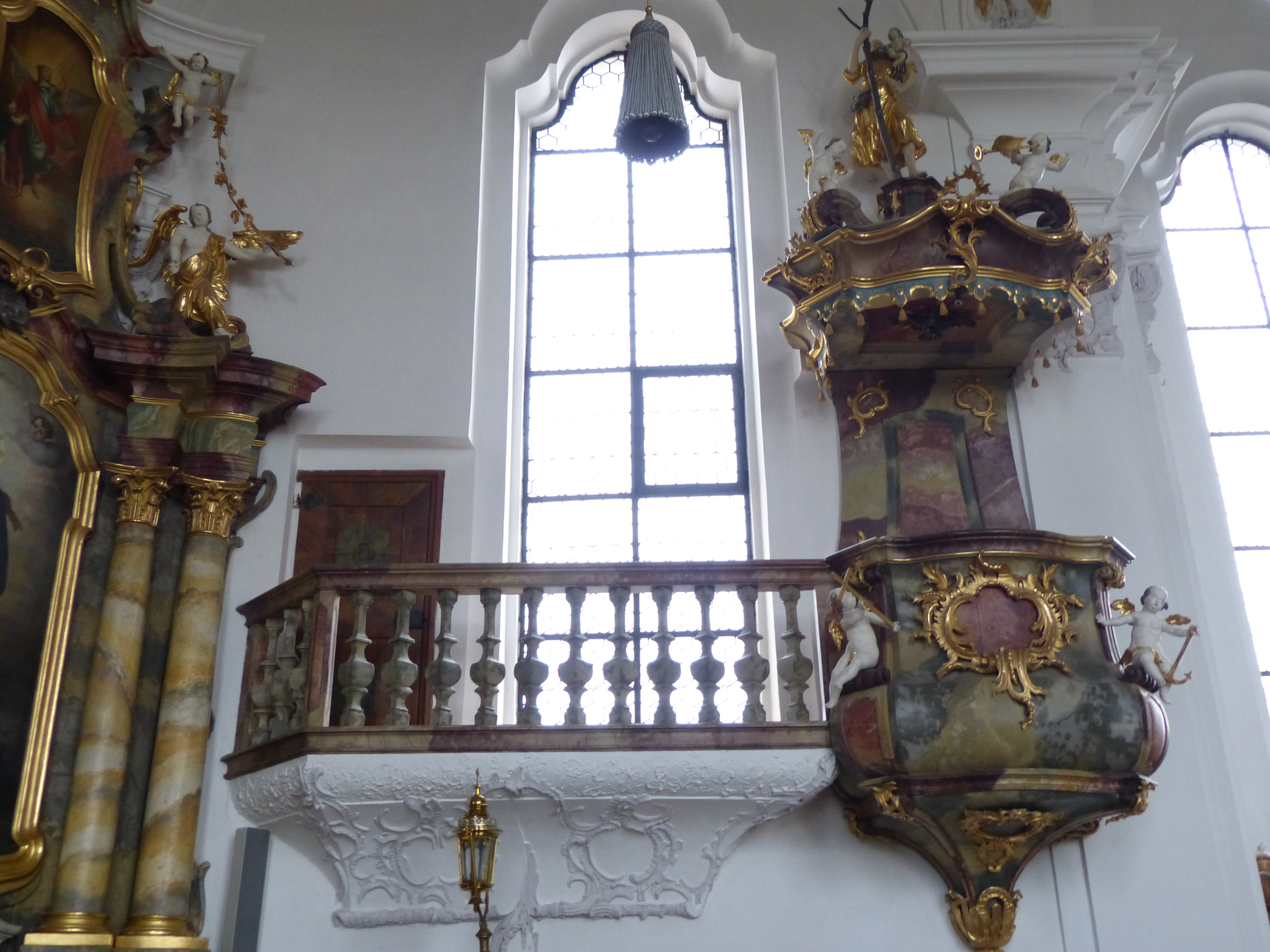 St. Gordian und Epimachus, Pleß, Landkreis Unterallgäu, Bayern